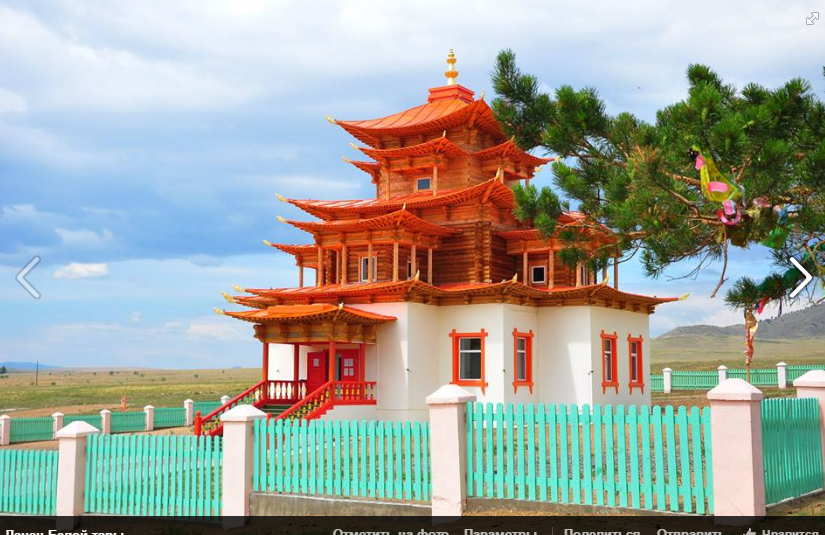 Atsaysky datsan in Buryatia, Selenga area